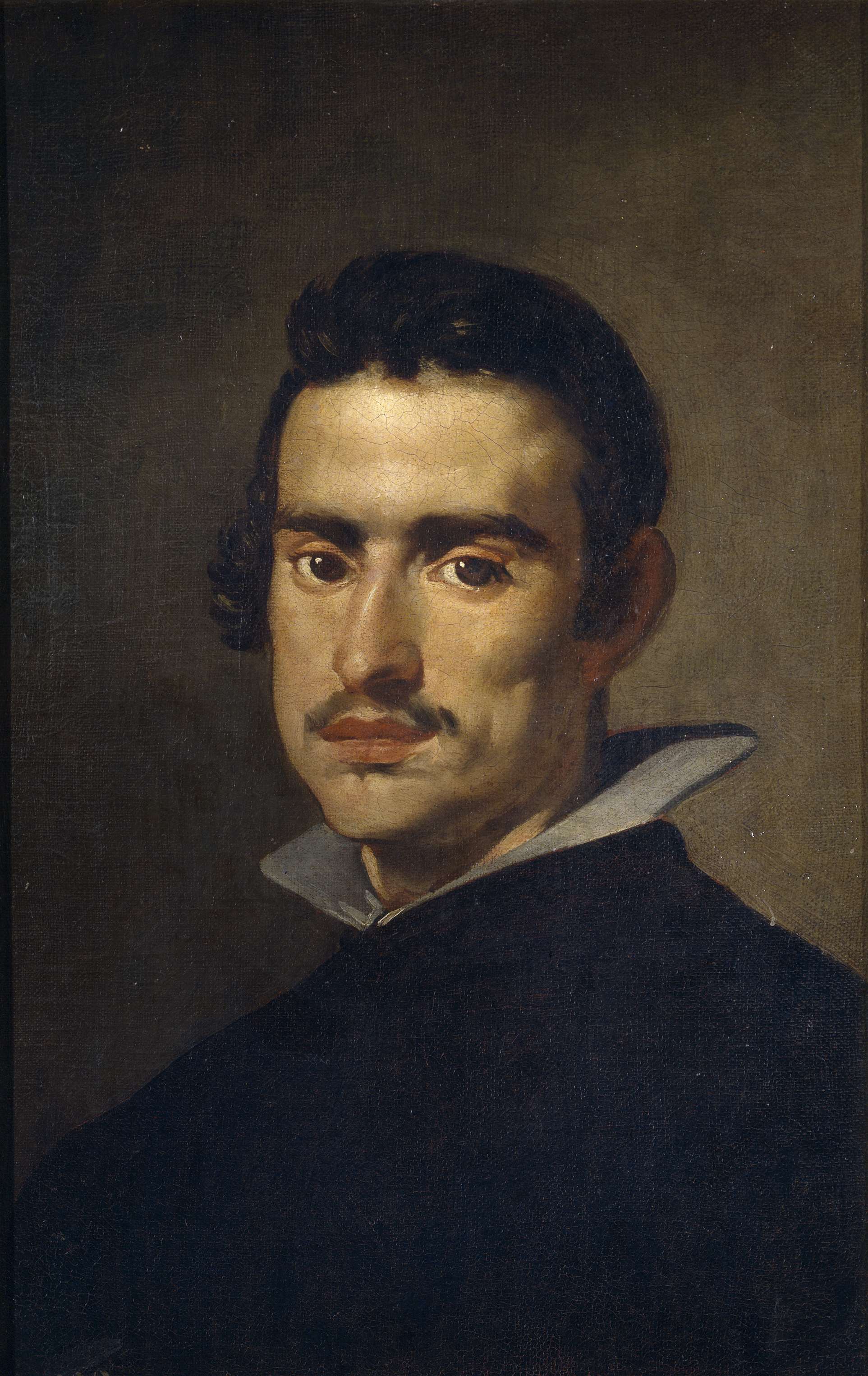 Retrato de un hombre joven.